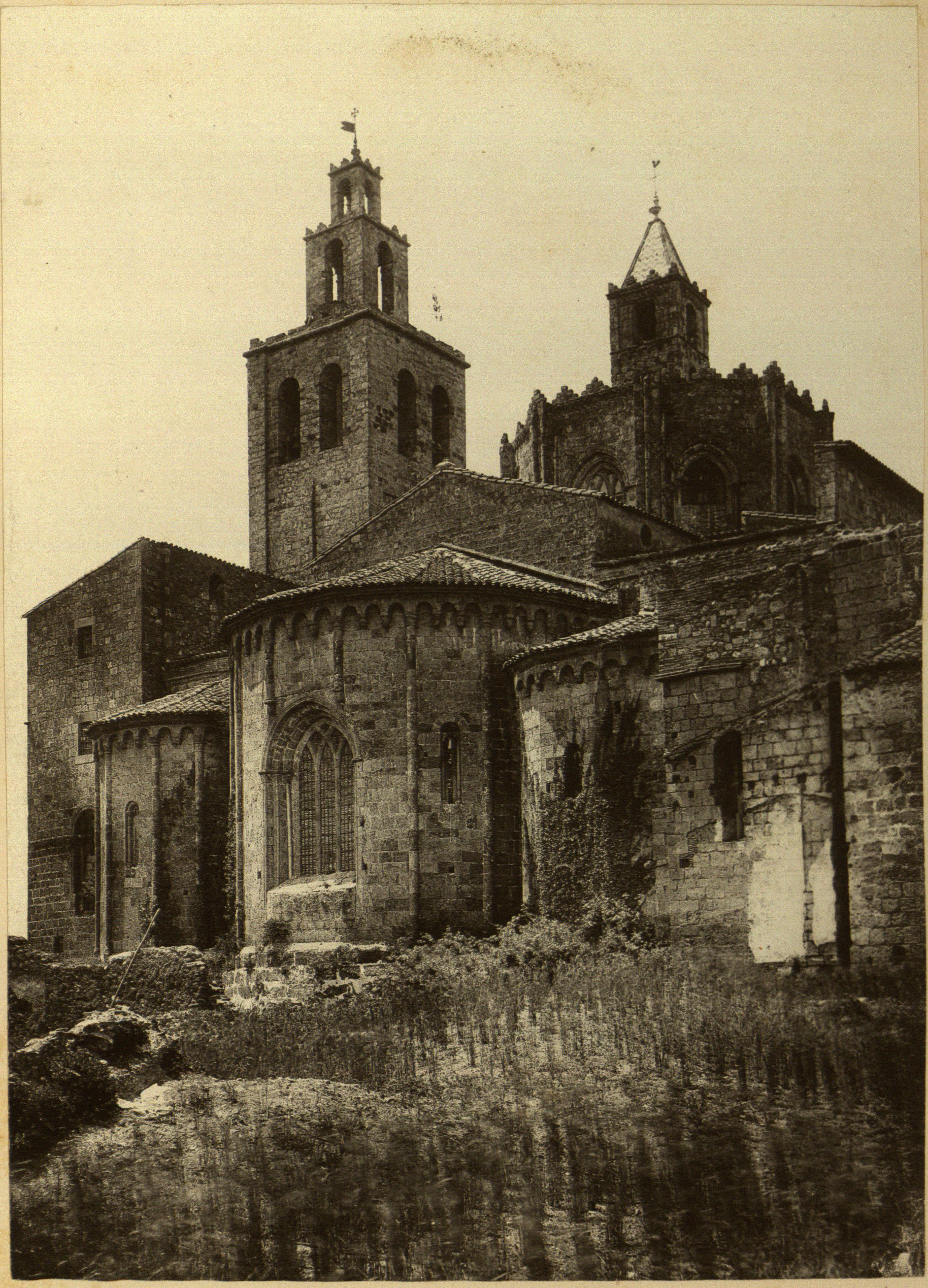 'Sant Cugat del Vallès', fotografia d'Heribert Mariezcurrena (~1878). Estampa núm. 16, acompanyada de text explicatiu, a l'Album Pintoresch-Monumental de Catalunya: aplech de vistas dels més notables monuments i paisatjes d'aquesta terra acompanyadas de descripcions y noticias históricas y de guias pera que sían fácilment visitats, publicat per l'Associació Catalanista d'Excursions Científiques el 1878. De disposició lliure al dipòsit digital de documents de la UAB.